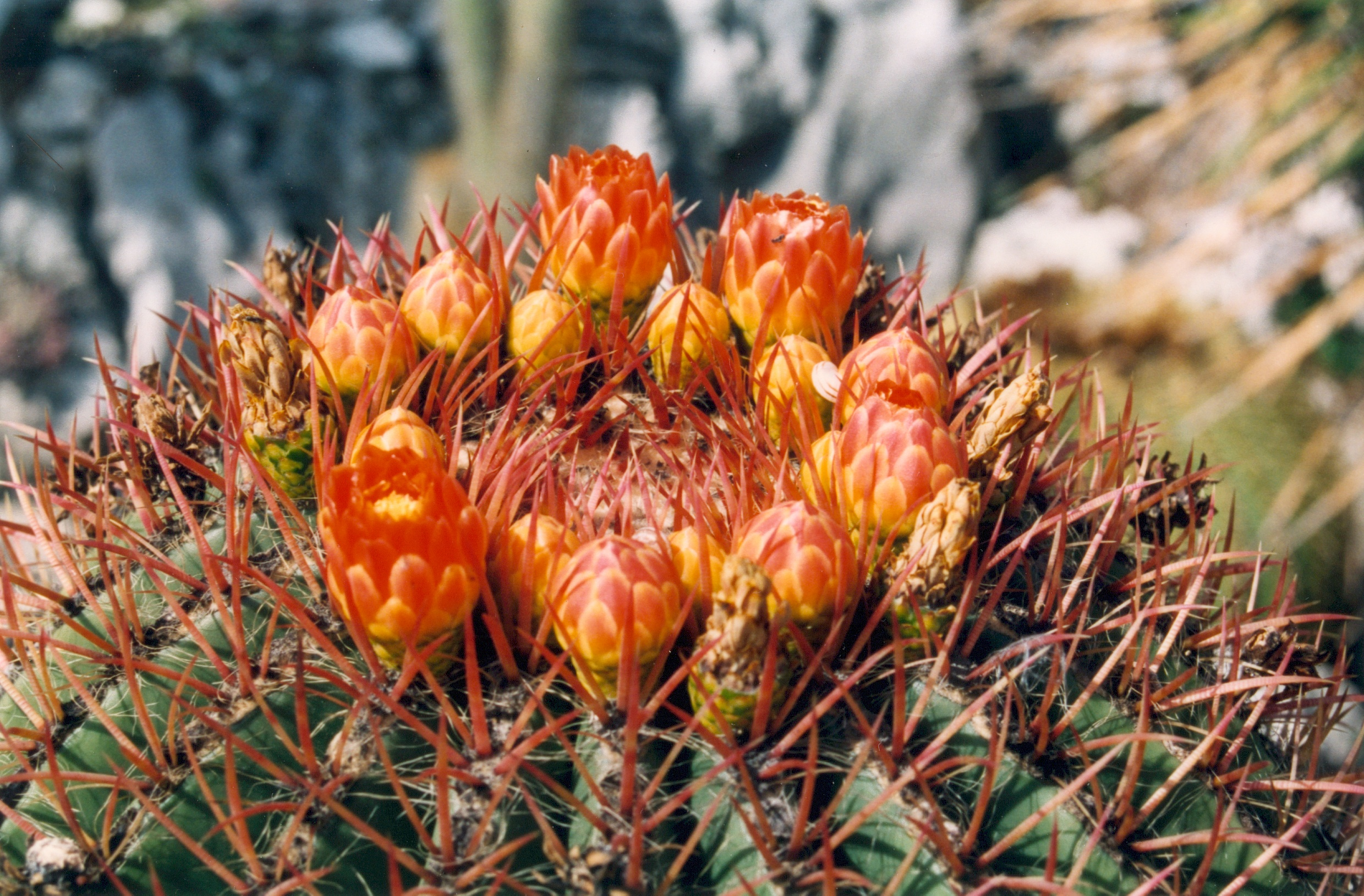 Photographie prise par GIRAUD Patrick